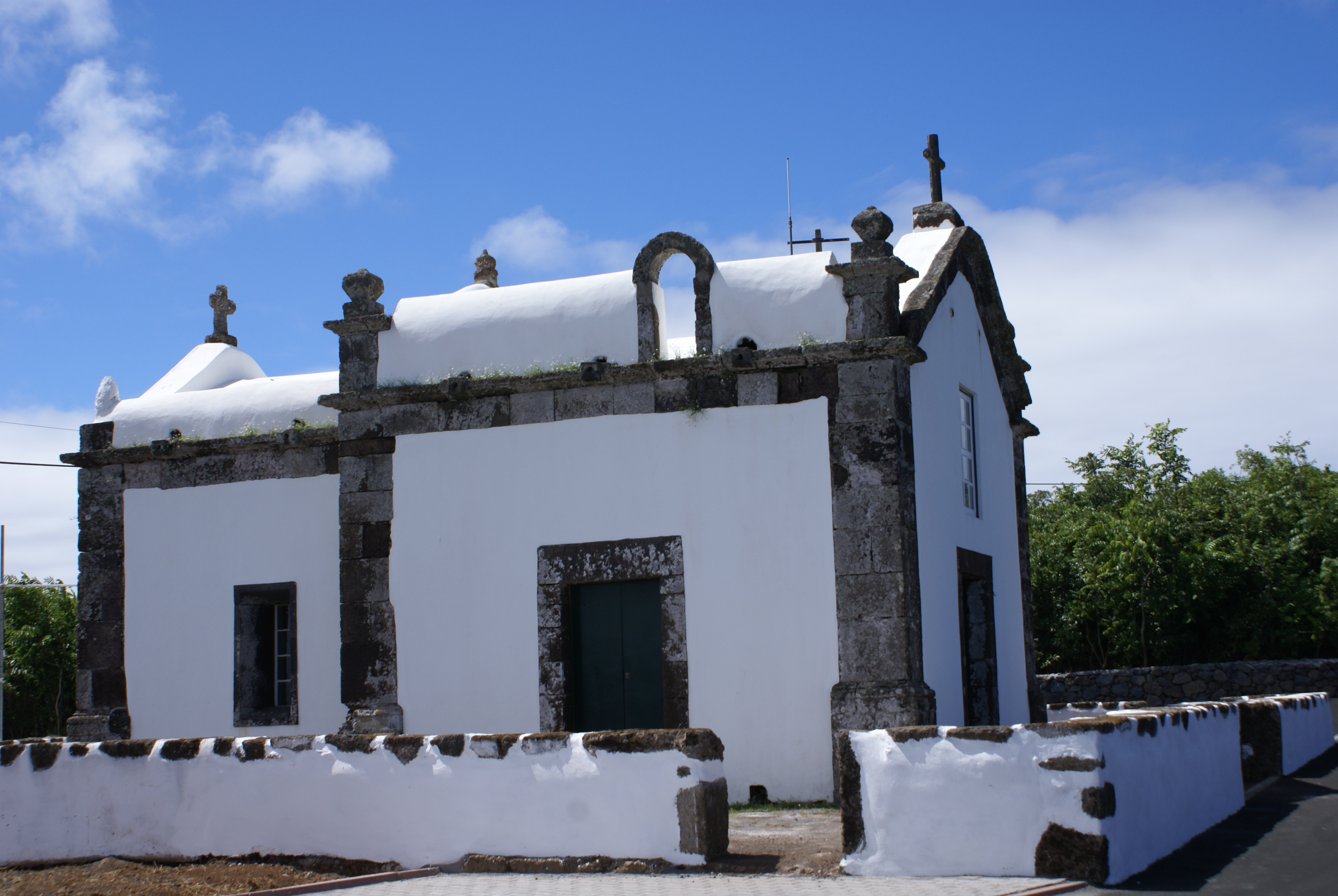 Ermida de São Salvador, Monte da Ajuda, Santa Cruz da Graciosa, ilha Graciosa, Açores, Portugal